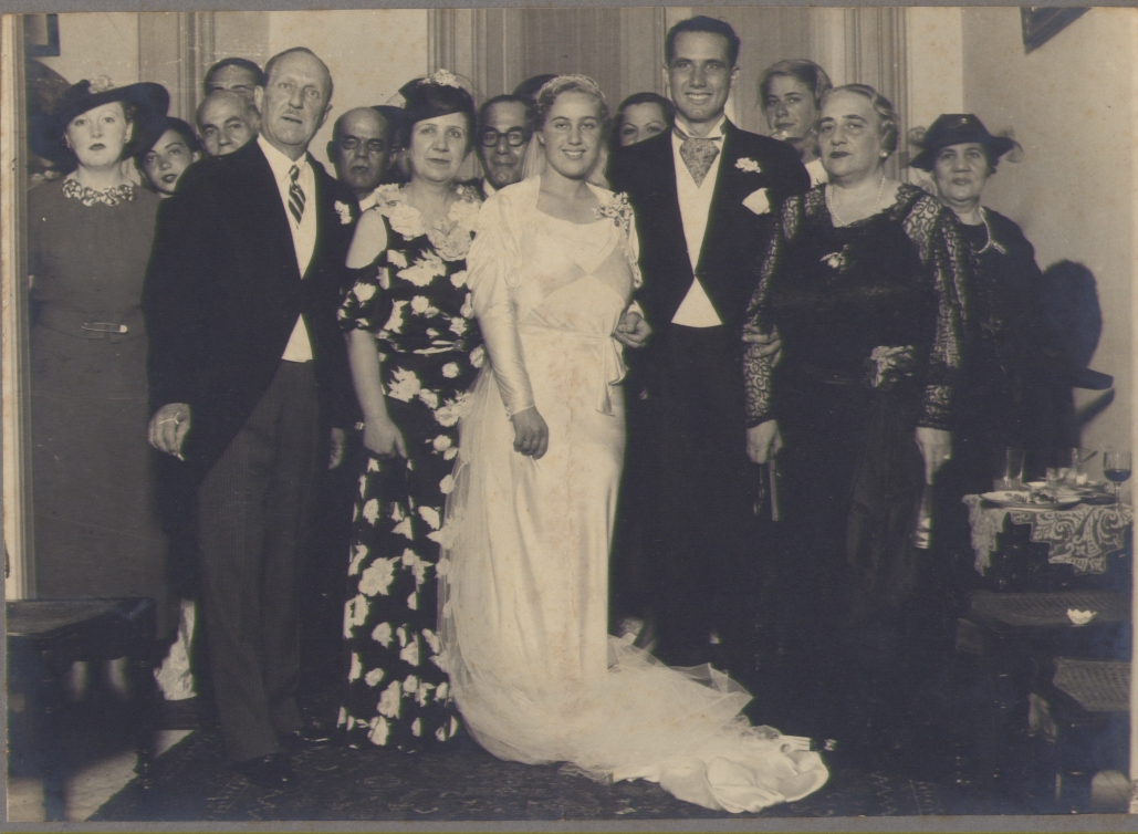 תצלום חתונת מכבי ורחל מוצרי- אלכסנדריה 1936. צמודה לרחל מזל (מתילדה) מוצרי ופליכס גרין. צמודה למכבי ג'נין גרין